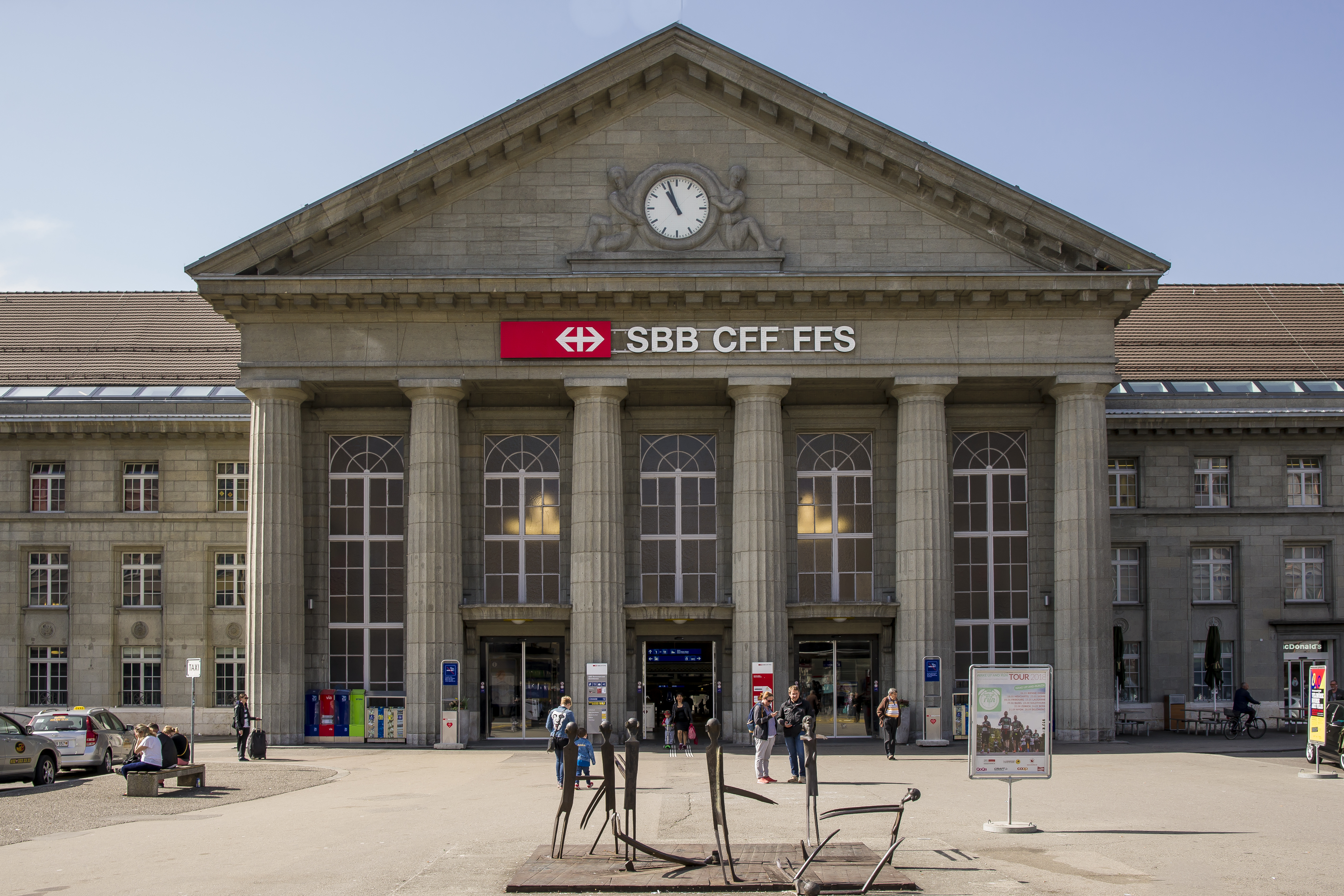 Bahnhof Gare railway station SBB Biel/Bienne